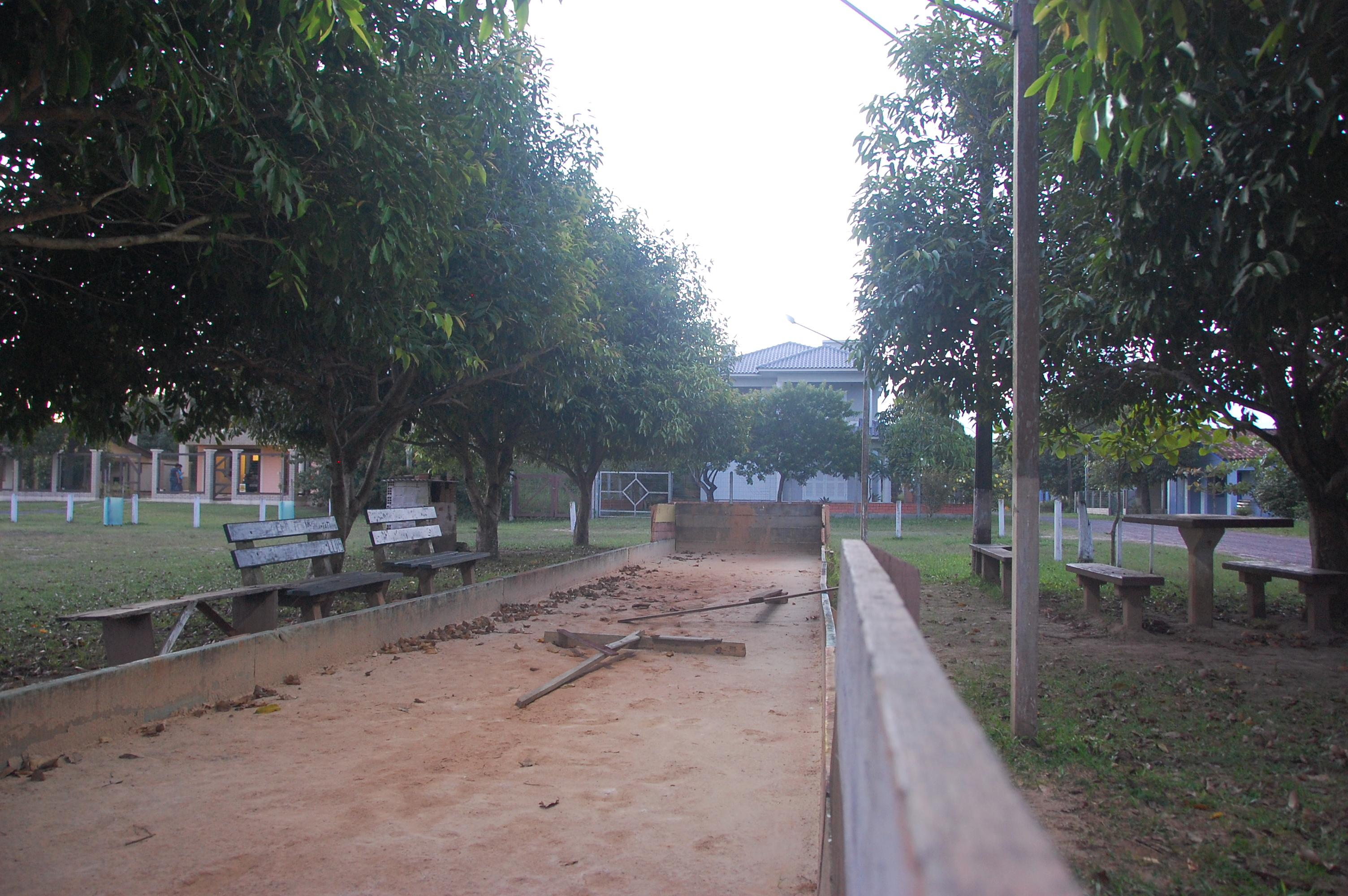 Cancha de Bocha na Praia Arroio Seco.